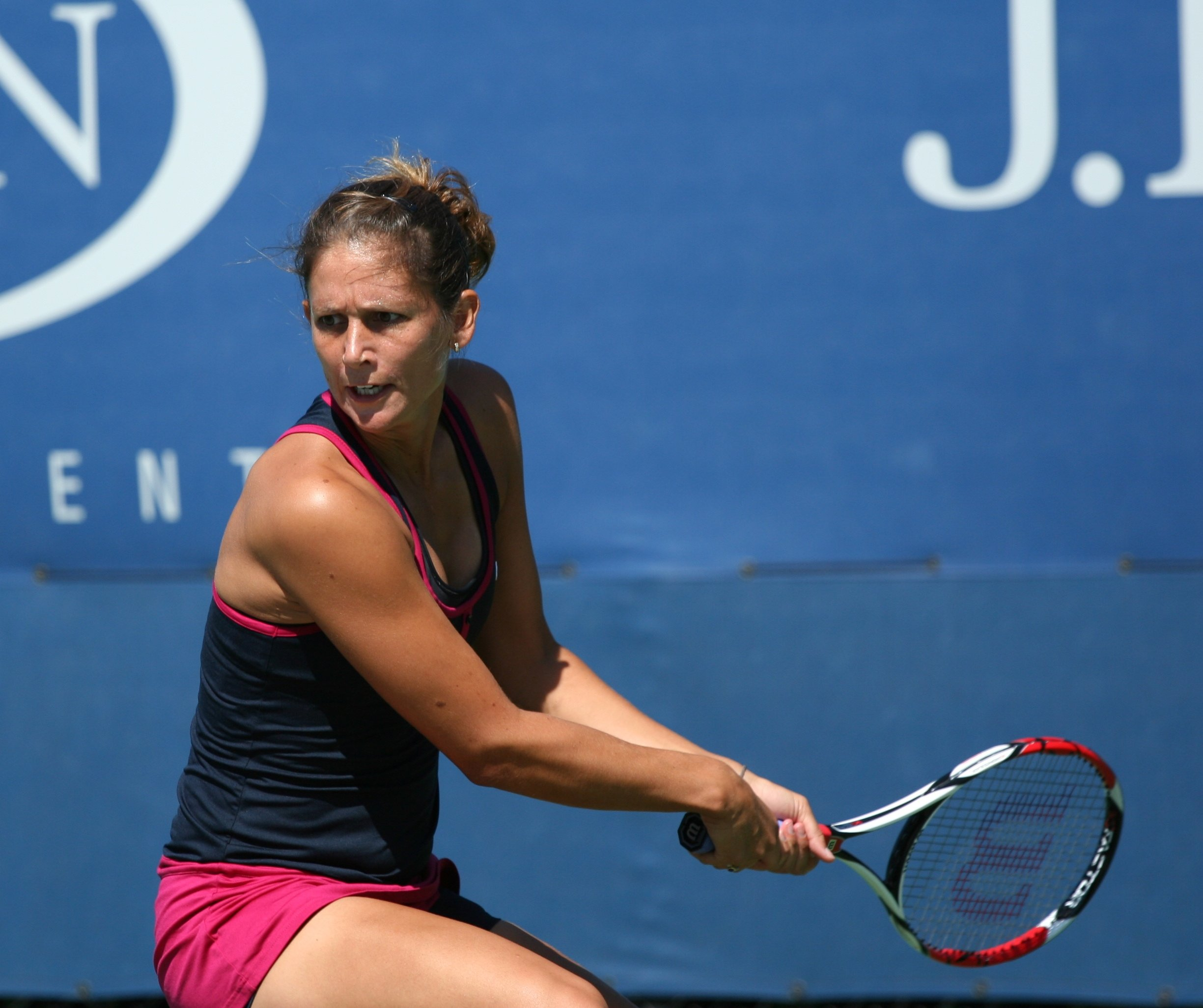 U.S. Open Wednesday, Sept. 2, 2009